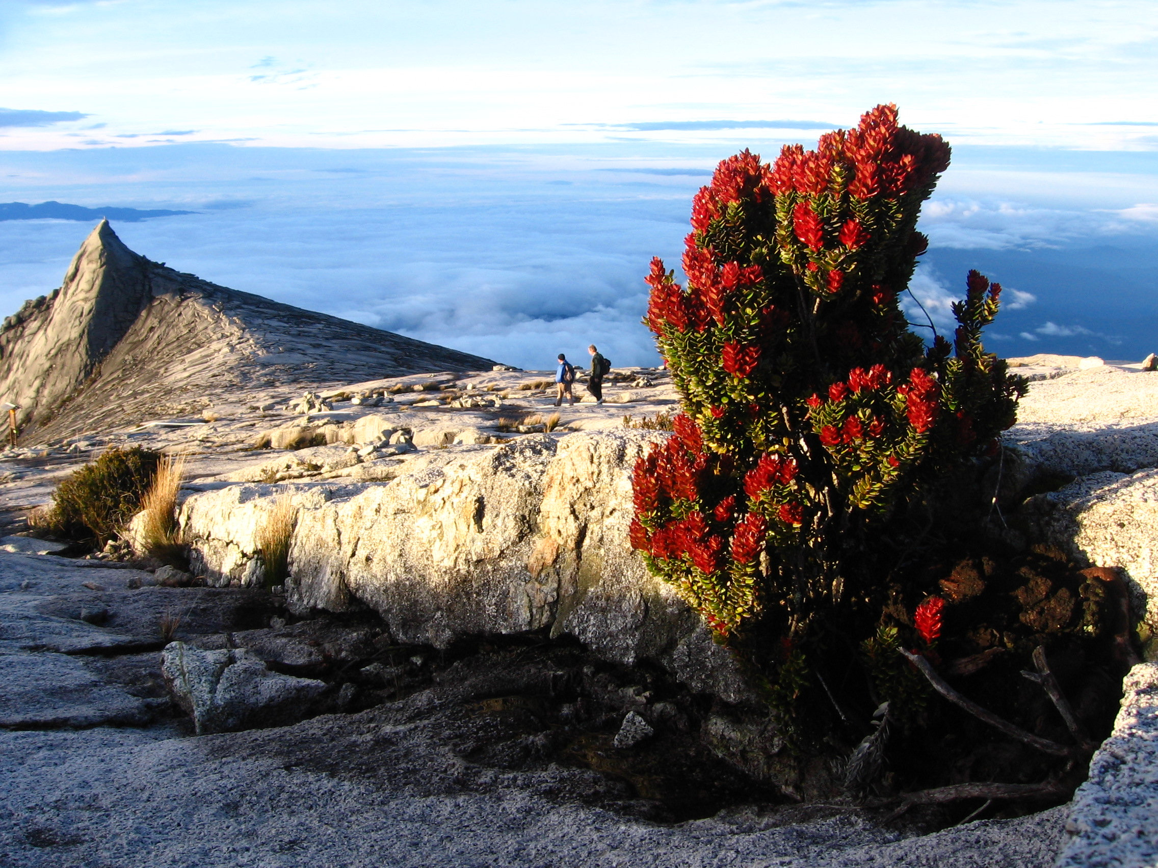 View from Mount Kinabalu in Sabah, Malaysia